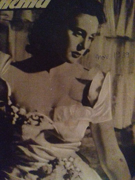 Olga Porumbaru nel novembre 1939